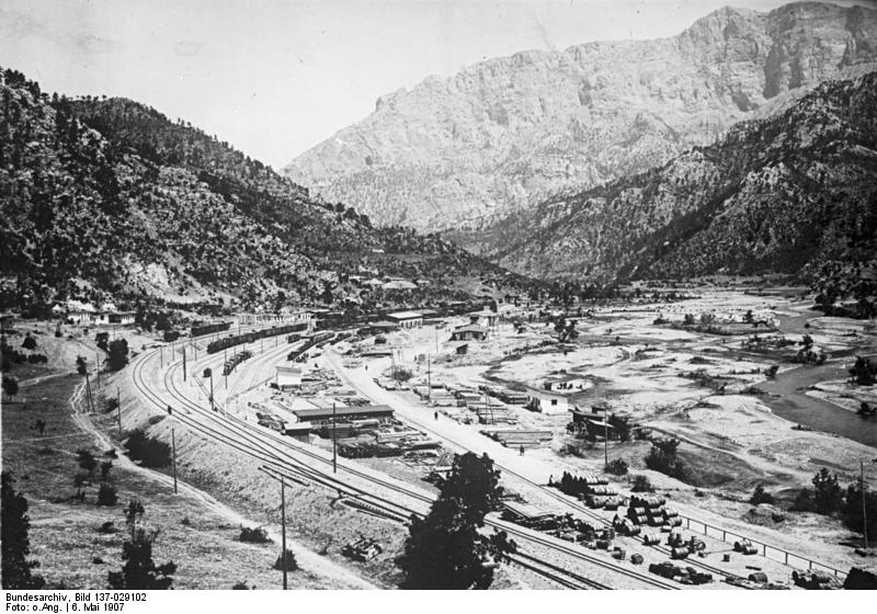 Asiatische Türkei, Karapunar, Bahnhofsanlagen der Bagdadbahn, Seite Adanar